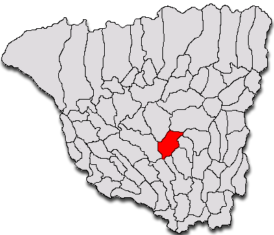 Categorie:Hărţi ale judeţului Gorj